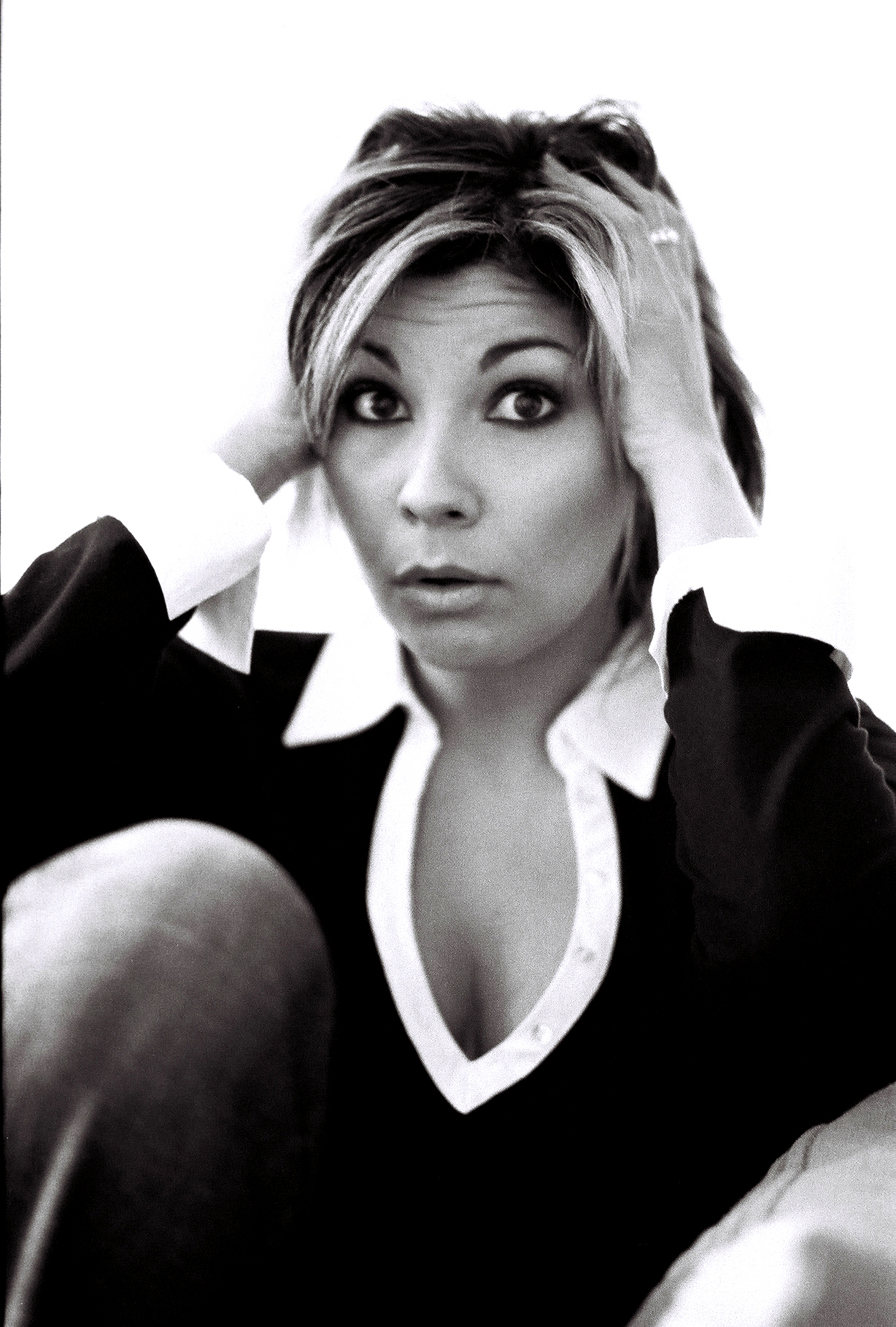 Kenza Braiga Temper 5